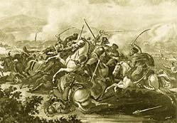 Zajetí generála D. R. Vandamma při bitvě u Chlumce